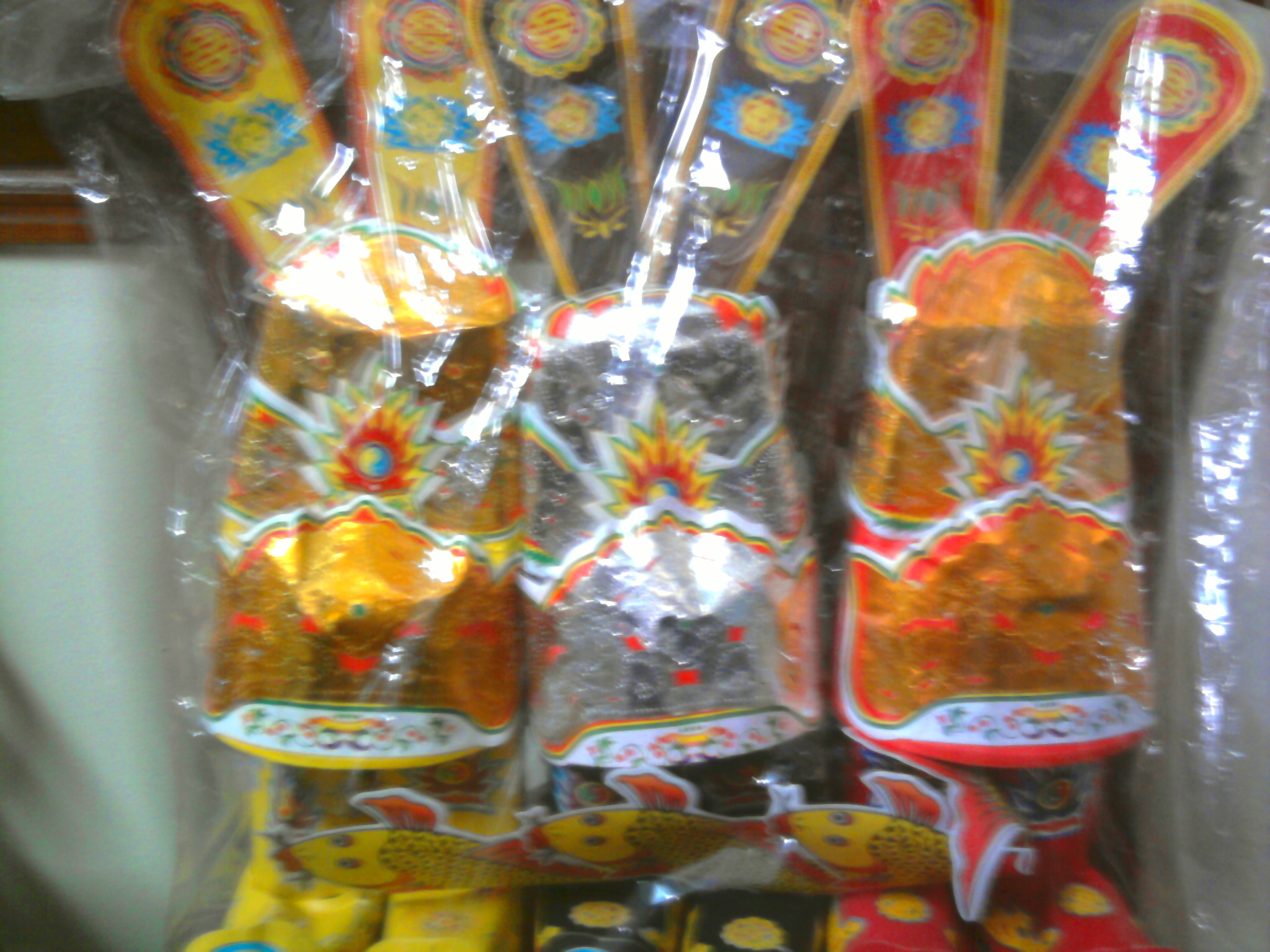 Bộ đồ ông Táo (chụp trước mặt, ở gần).